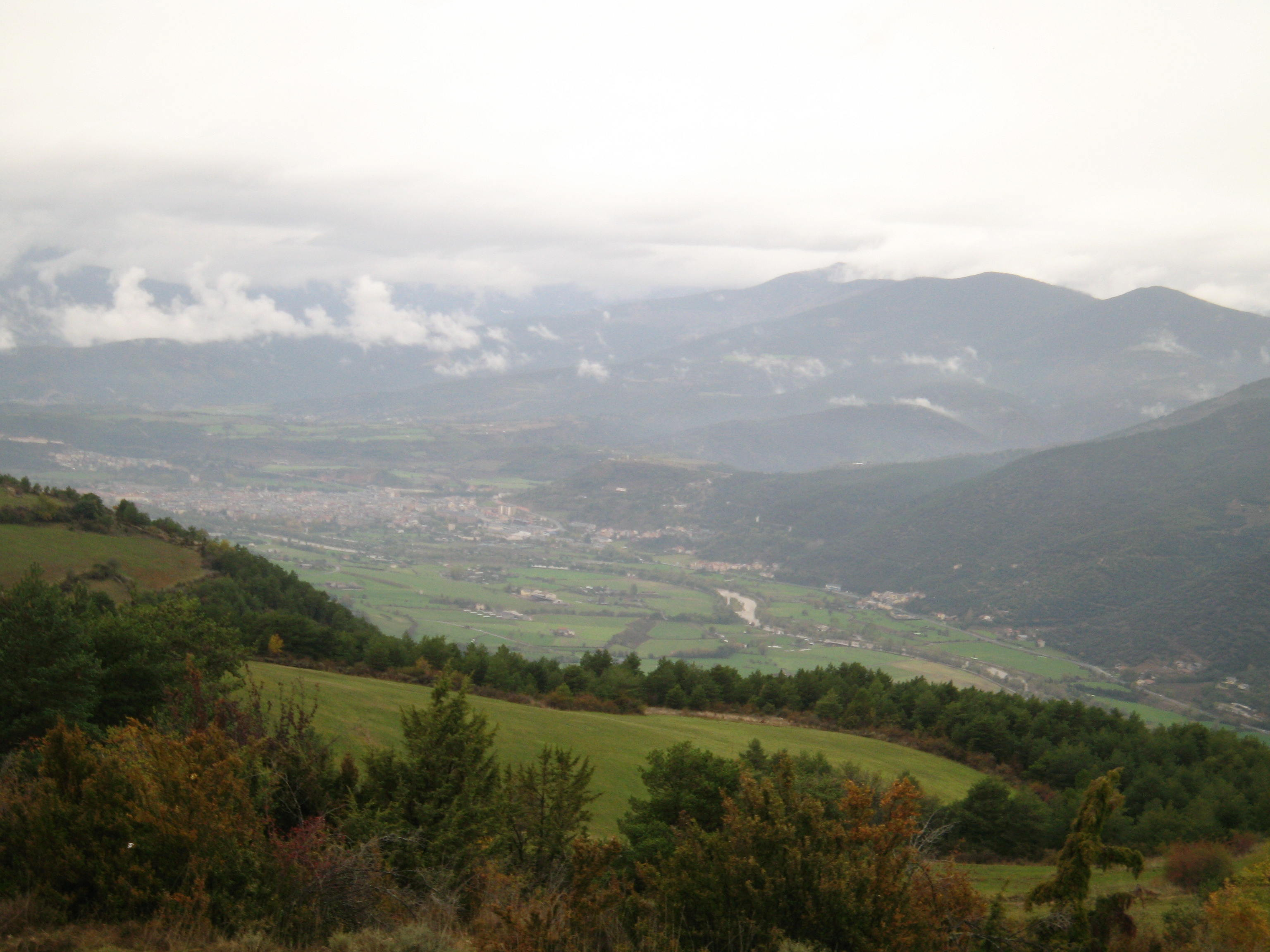 Vista de la plana de la Seu, des del poble de Vilanova de Banat (Alàs i Cerc)